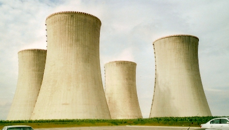 chladící věže JE Dukovany